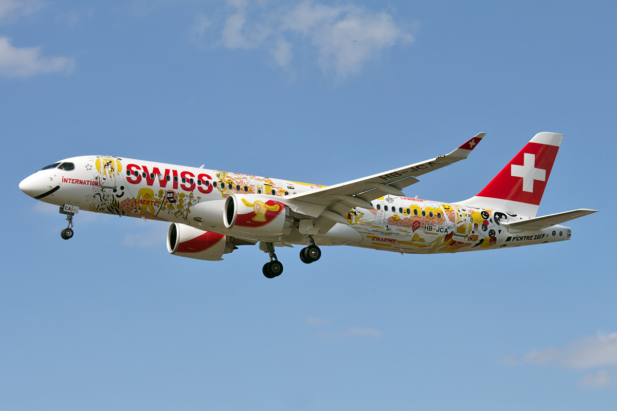 HB-JCA_170615_LHR_6140